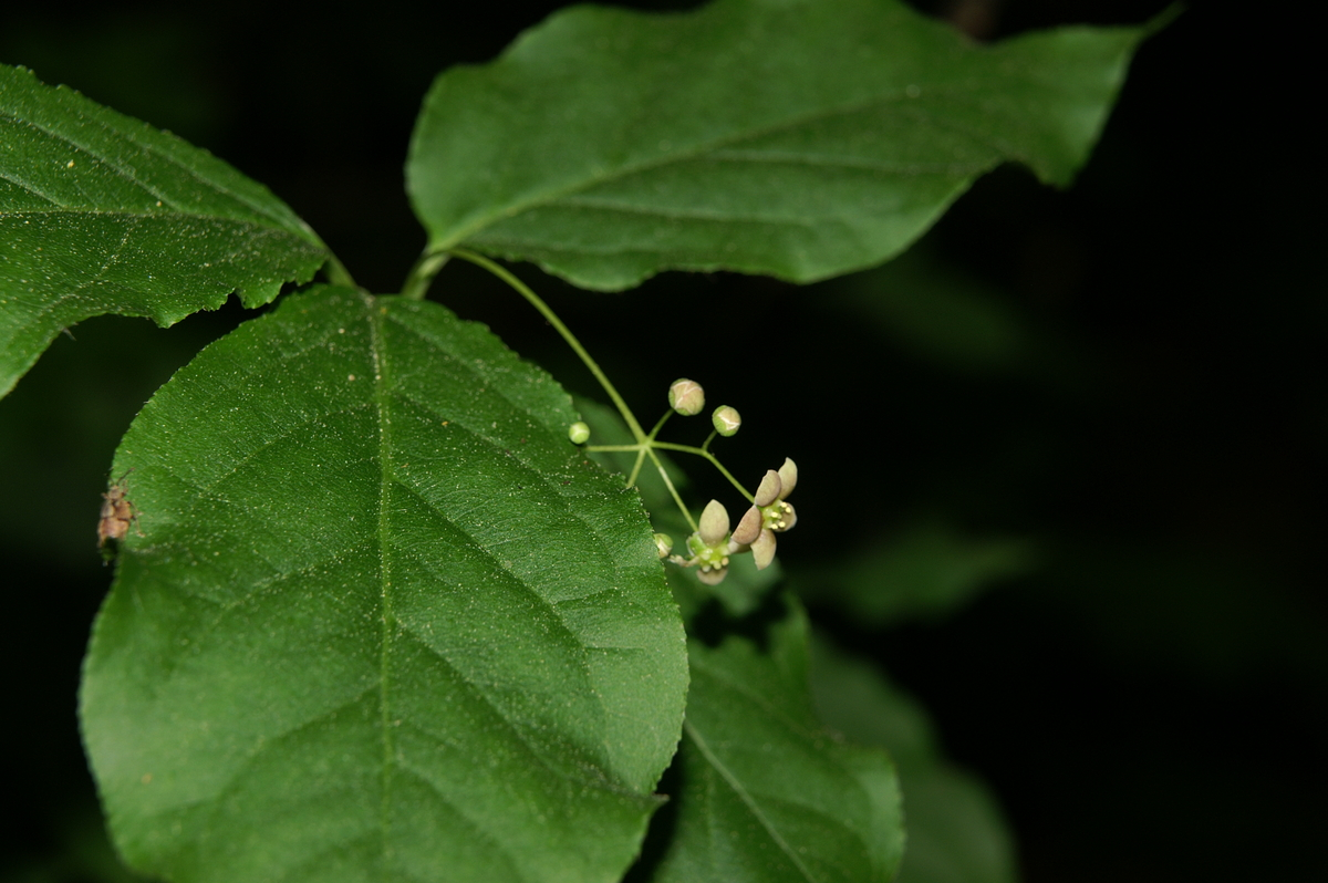 Širokolistna trdoleska na Toškem Čelu.